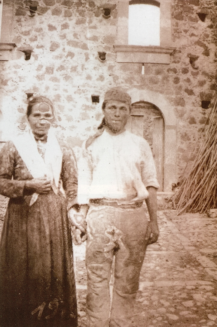 La Sicilia rurale di un fotografo d'eccezione, Giovanni Verga. L'immagine è del 1897 e ritrae i coniugi Pisasale al servizio della famiglia Verga nella campagna di Tèbidi, territorio di Vizzini.